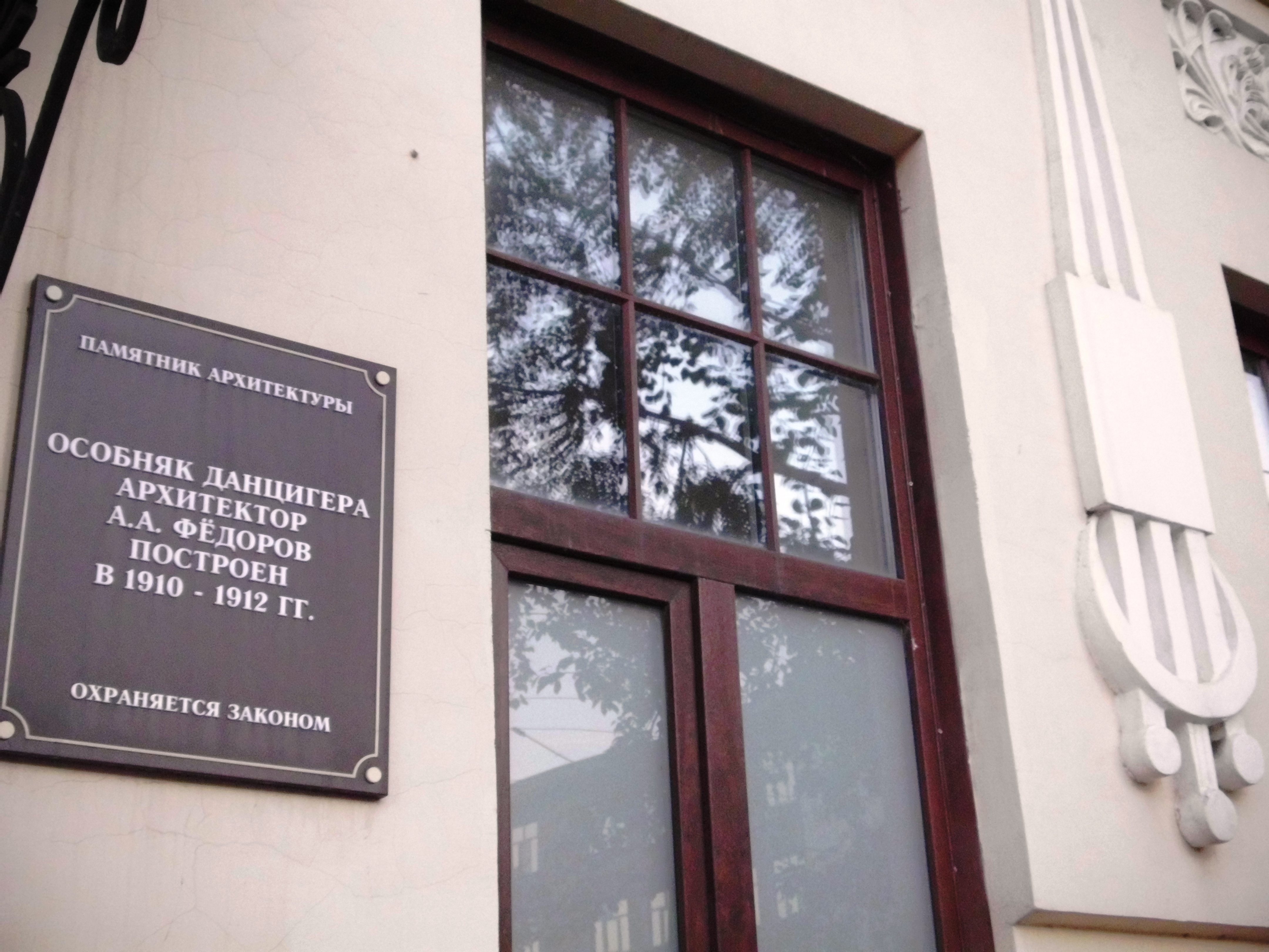 Дом Данцингера С.Г.: улица Труда, 83 / улица Пушкина, 1, Челябинск, Челябинская область. Табличка о статусе здания на фасаде со стороны улицы Пушкина.